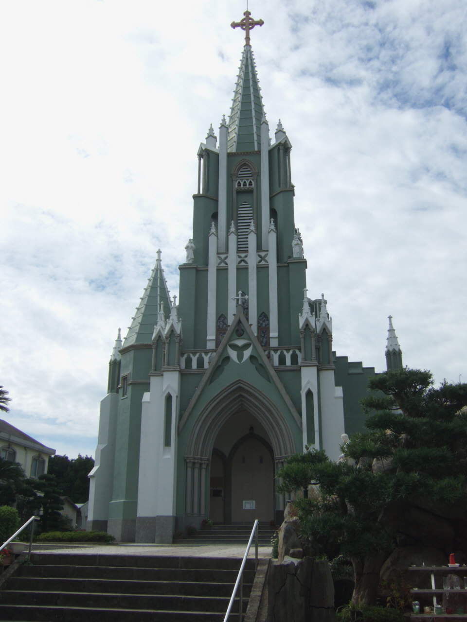 聖フランシスコ・ザビエル記念教会（平戸教会）